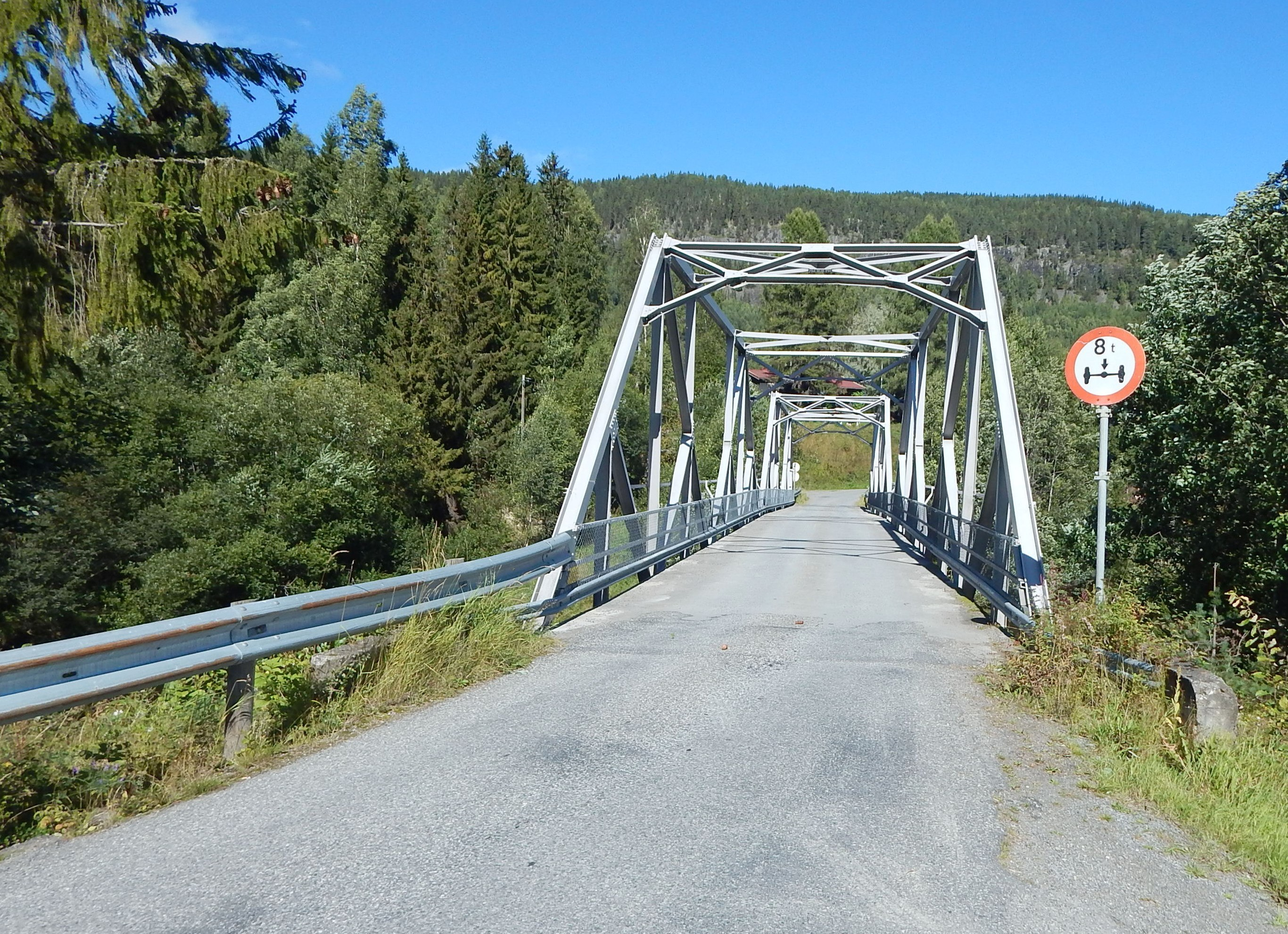 Veståsvegen over Etna på Nordsinni